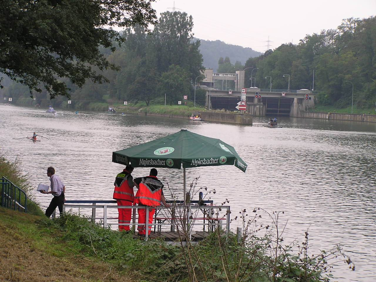 Schleuse bei Marbach am NeckarRomână: Ecluza de la Marbach am Neckar